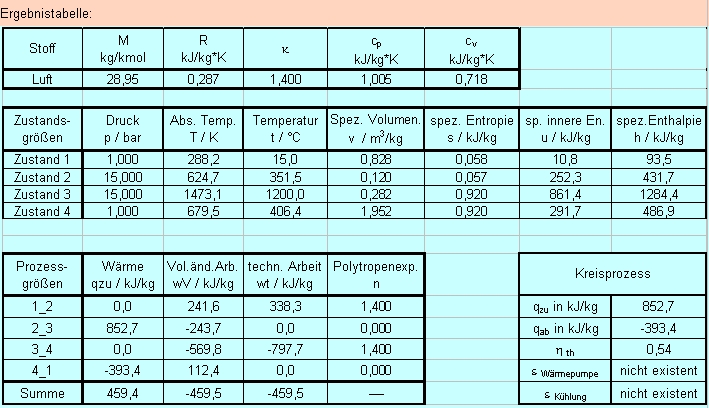 Daten des Joule-Prozesses